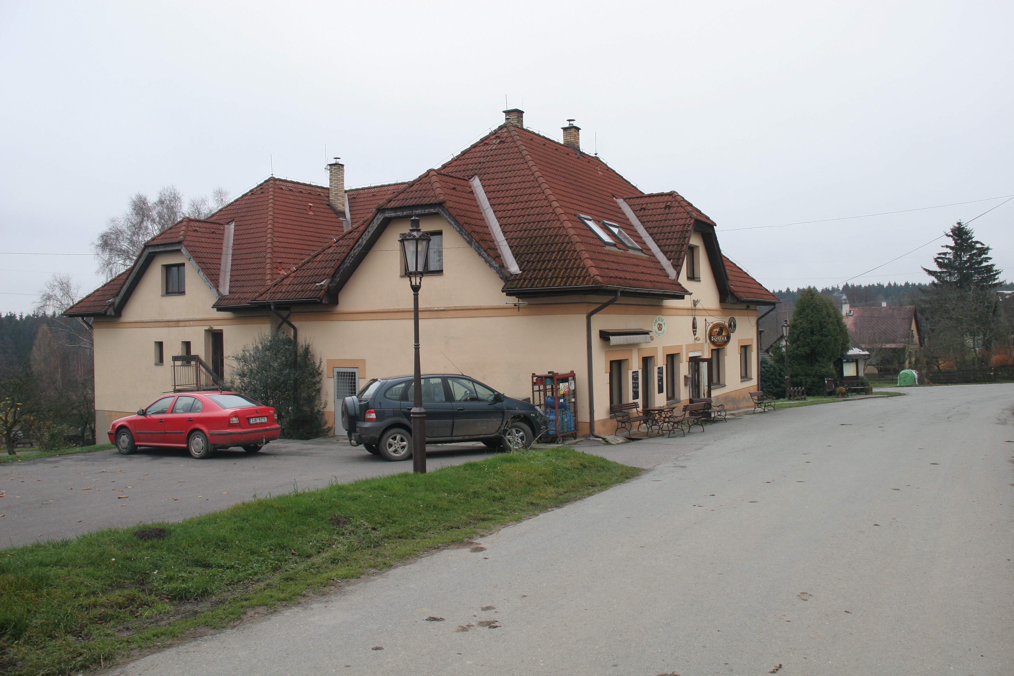 Krásné hospoda